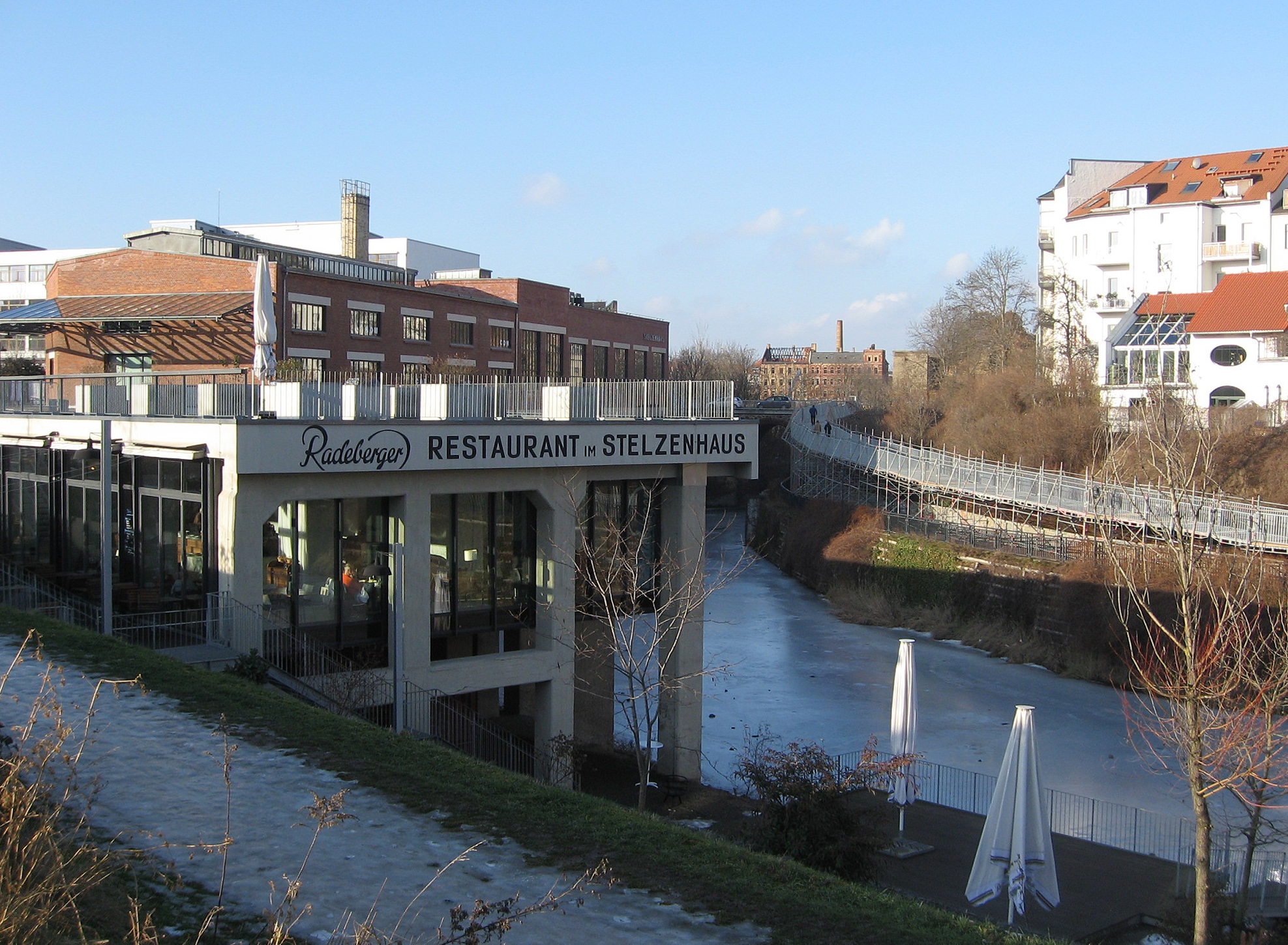 Das Stelzenhaus in Leipzig-Plagwitz im Winter